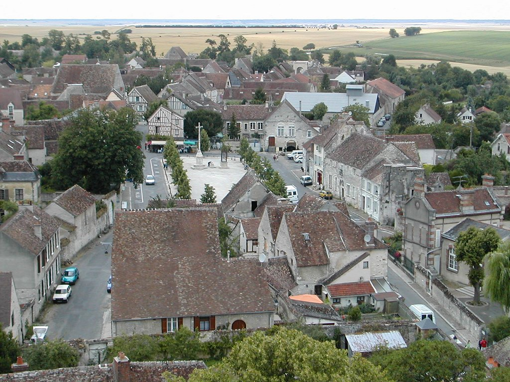 Vue de Provins de la tour César (Seine et Marne, France)